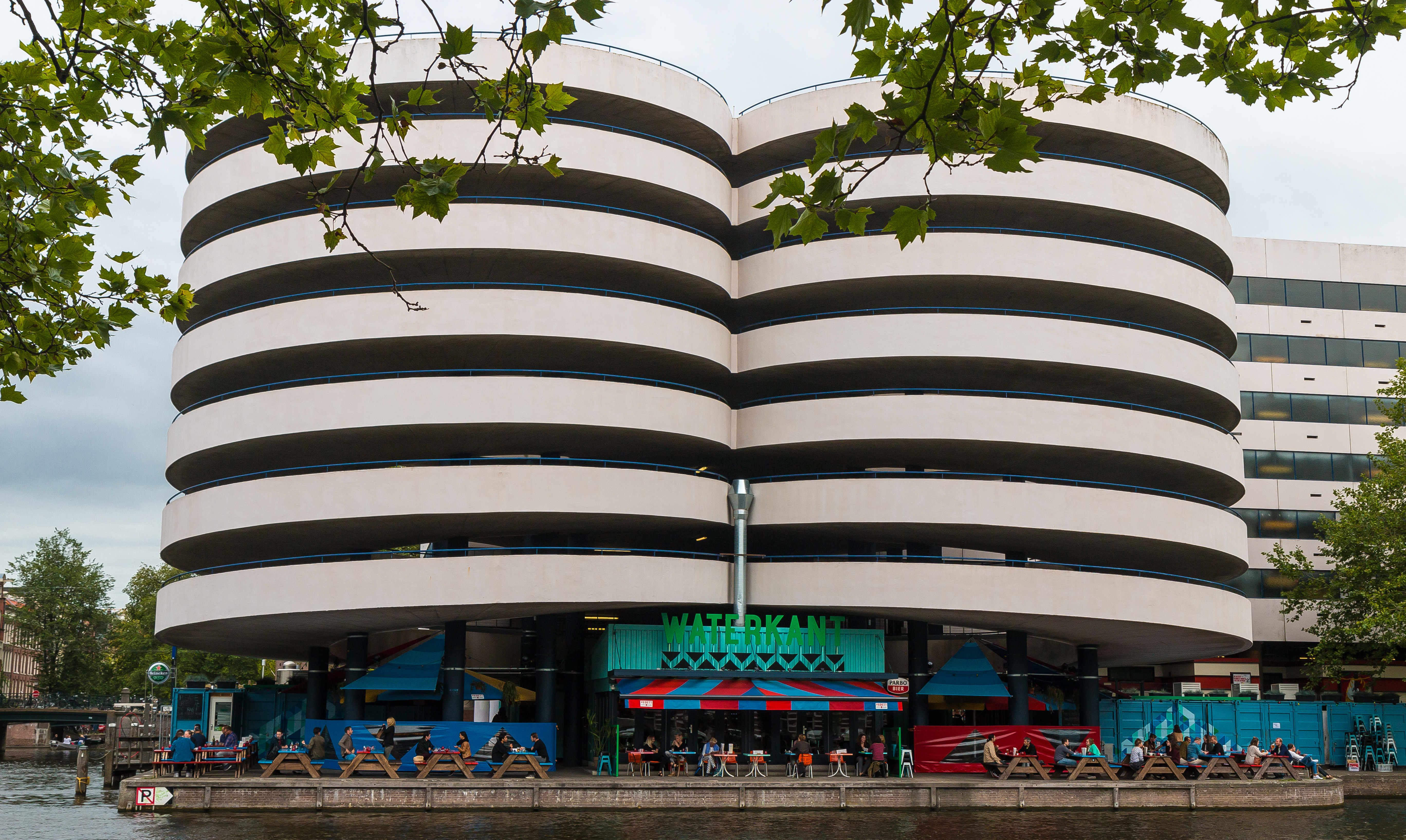 Europarking Marnixstraat te Amsterdam